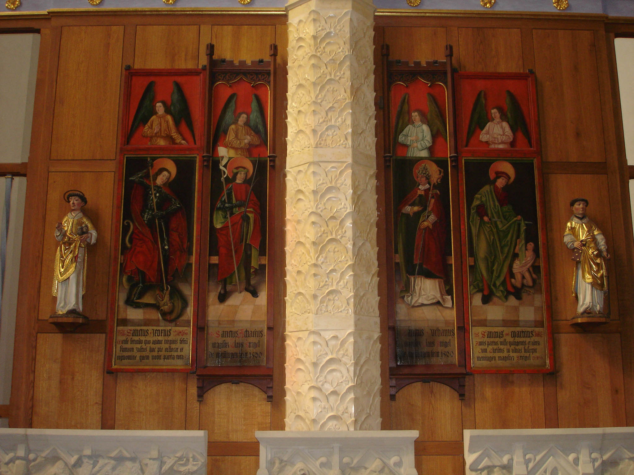 Der Memminger Altar in der Münchner Frauenkirche am Chorabschluss